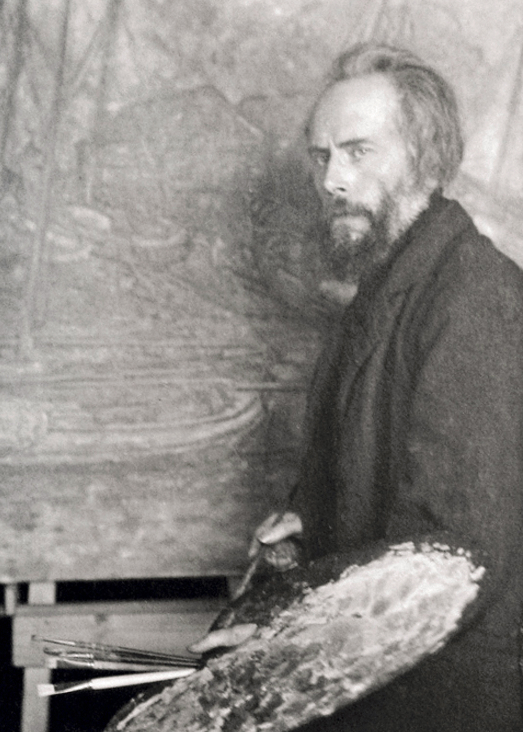 Portrait de William Degouve de Nuncques dans son atelier peignant « Les Chantiers de bateaux à Huysen »